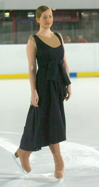 Azra Delić revija